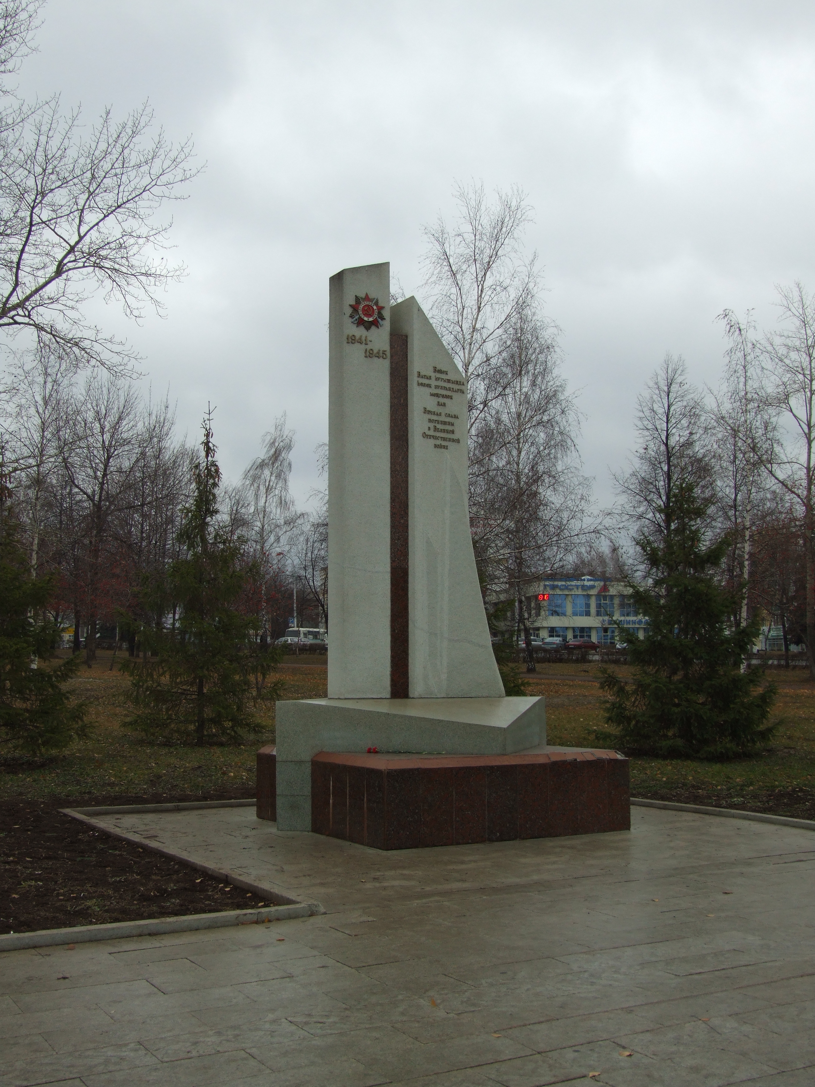 Россия, Республика Башкортостан, г. Уфа. Памятник погибшим в Великой Отечественной войне 1941-1945гг. в парке за ДК Молодёжи (ДК Юбилейный)